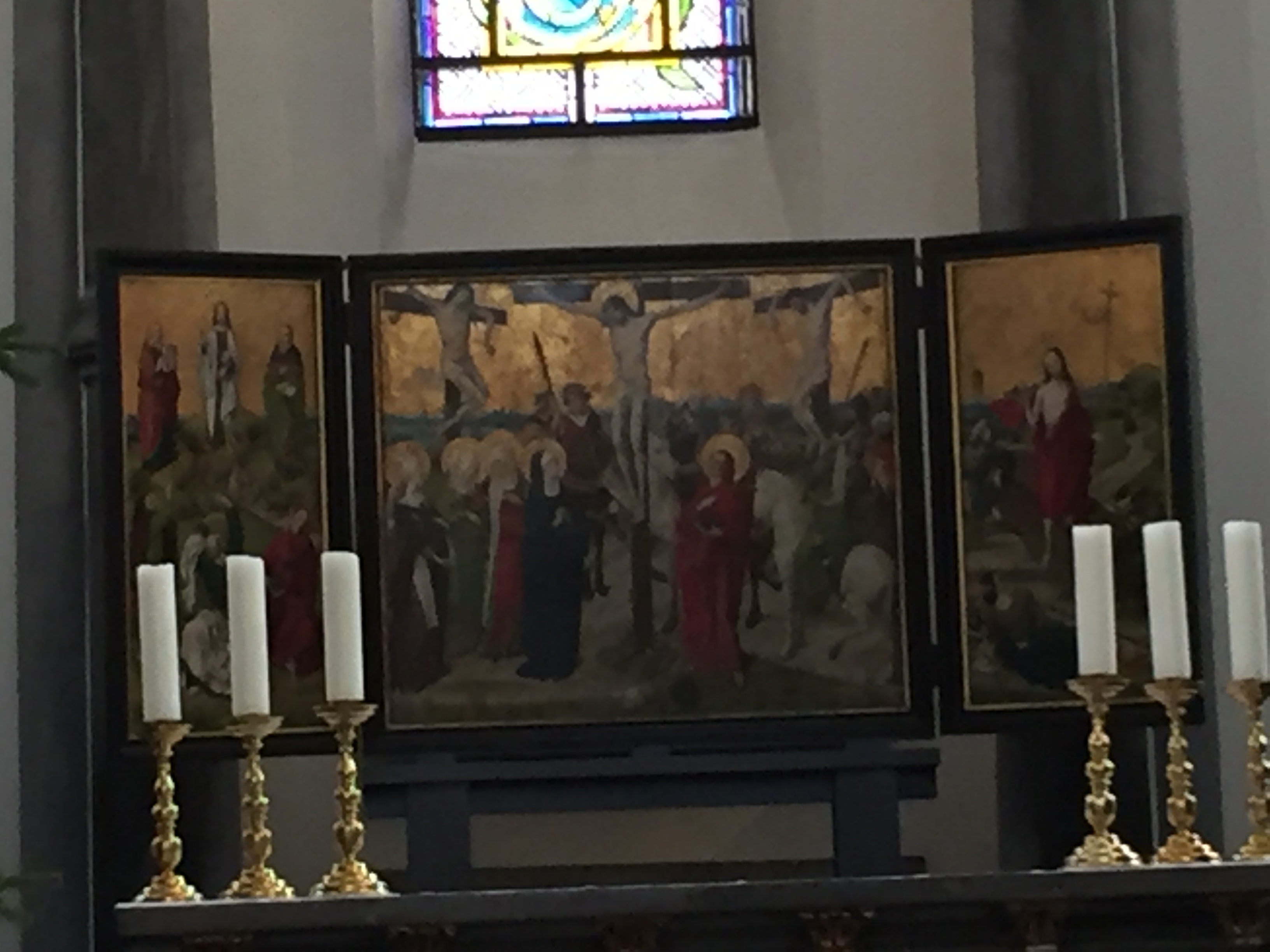 Kreuzigung Christi vom Meister der Georgslegende, Altargemälde aus St. Kunibert, Köln